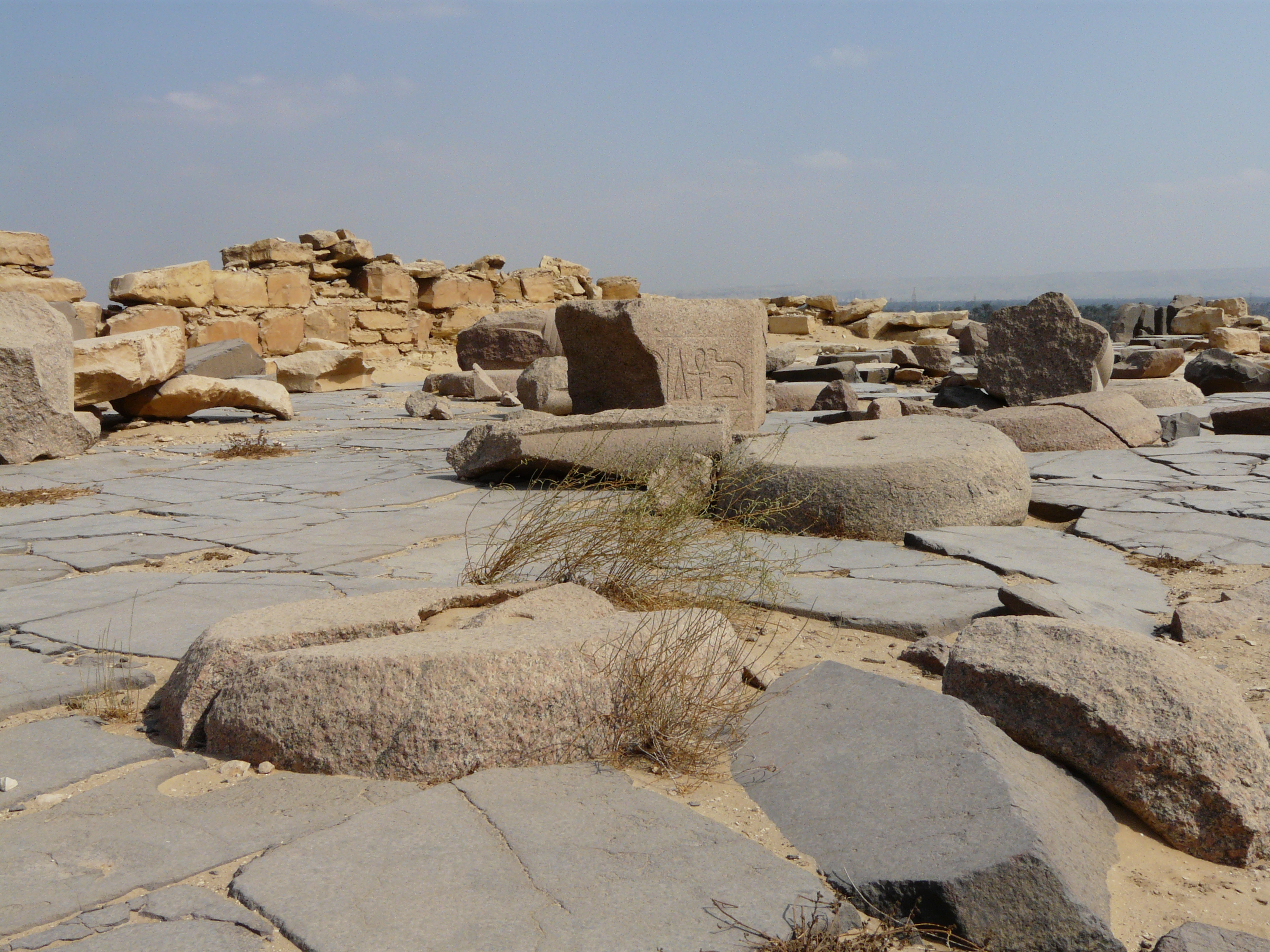 Temple du complexe funéraire de Niouserrê (Ve dynastie) - Abousir